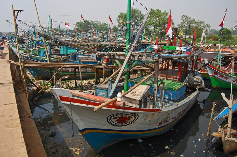 Traditional fish-boat, Muara Angke, Jakarta, Indonesia